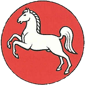 Symbol von Niedersachsen / Symbol of Lower Saxony